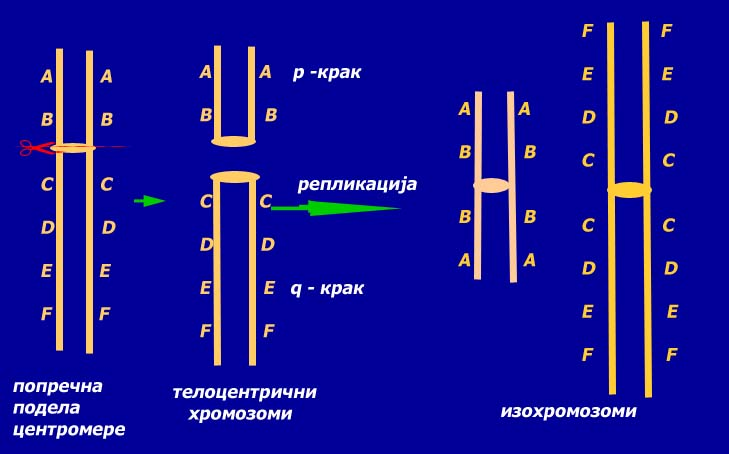 аутор: Снежана Трифуновић